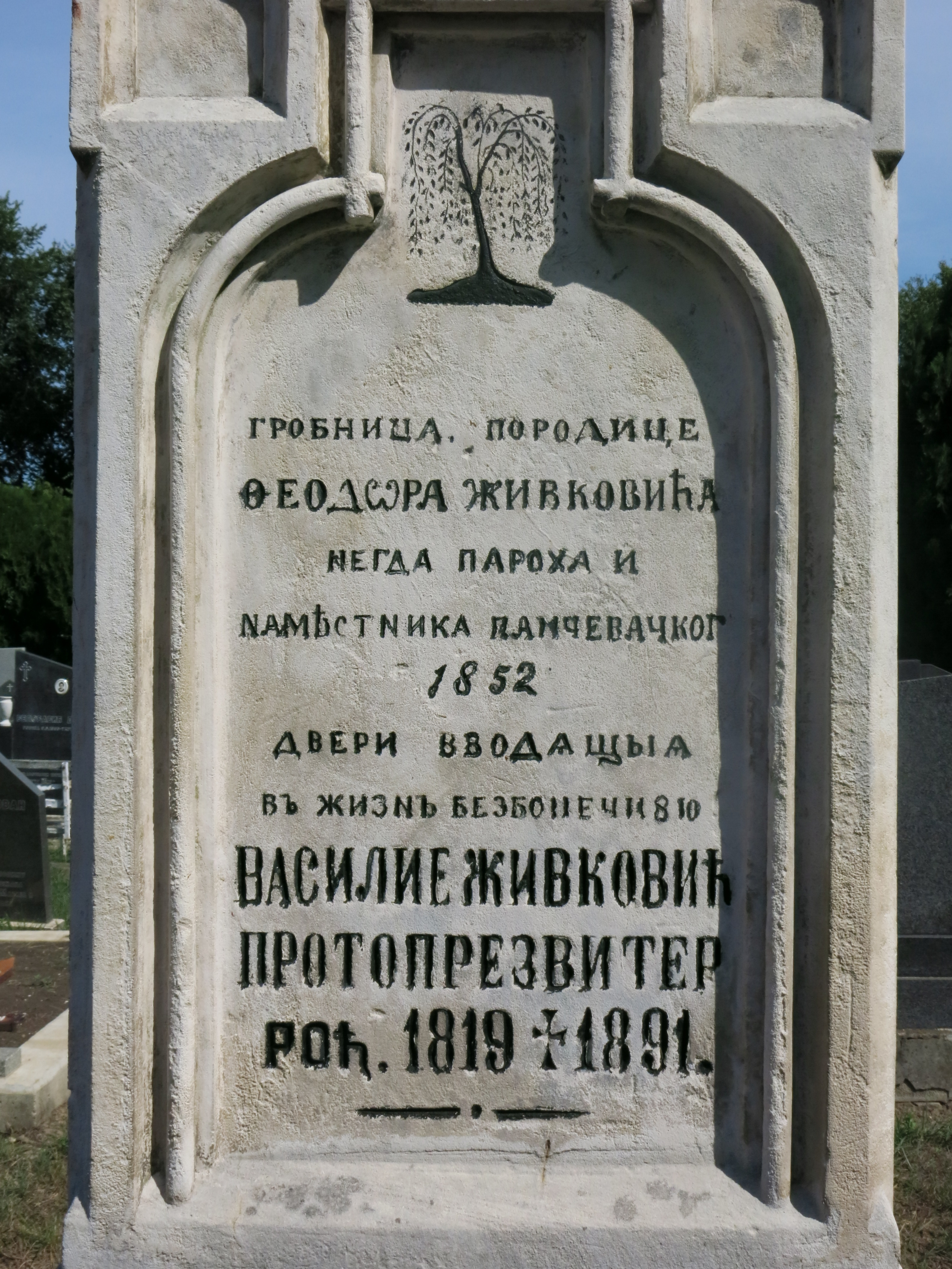 Надгробни споменик Василија Живковића